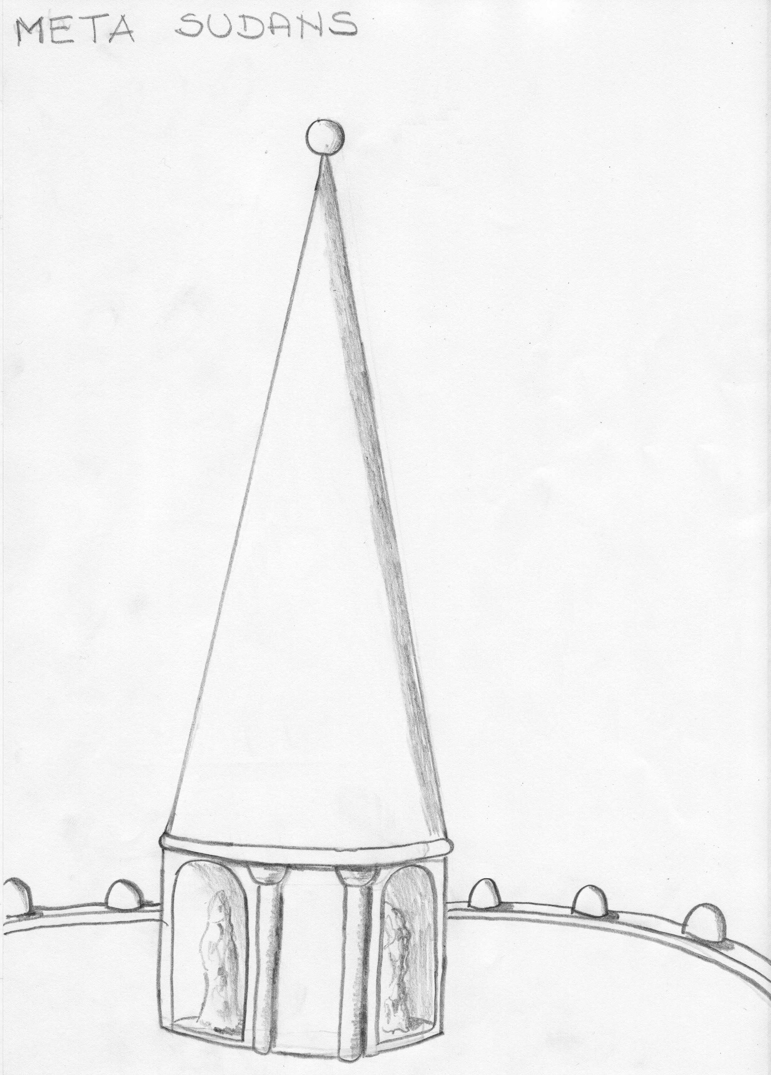 In questo disegno eseguito a matita è rappresentata la ricostruzione non in scala della Meta Sudans, fontana monumentale che si trovava davanti al Colosseo e della quale non rimangono che le fondazioni.